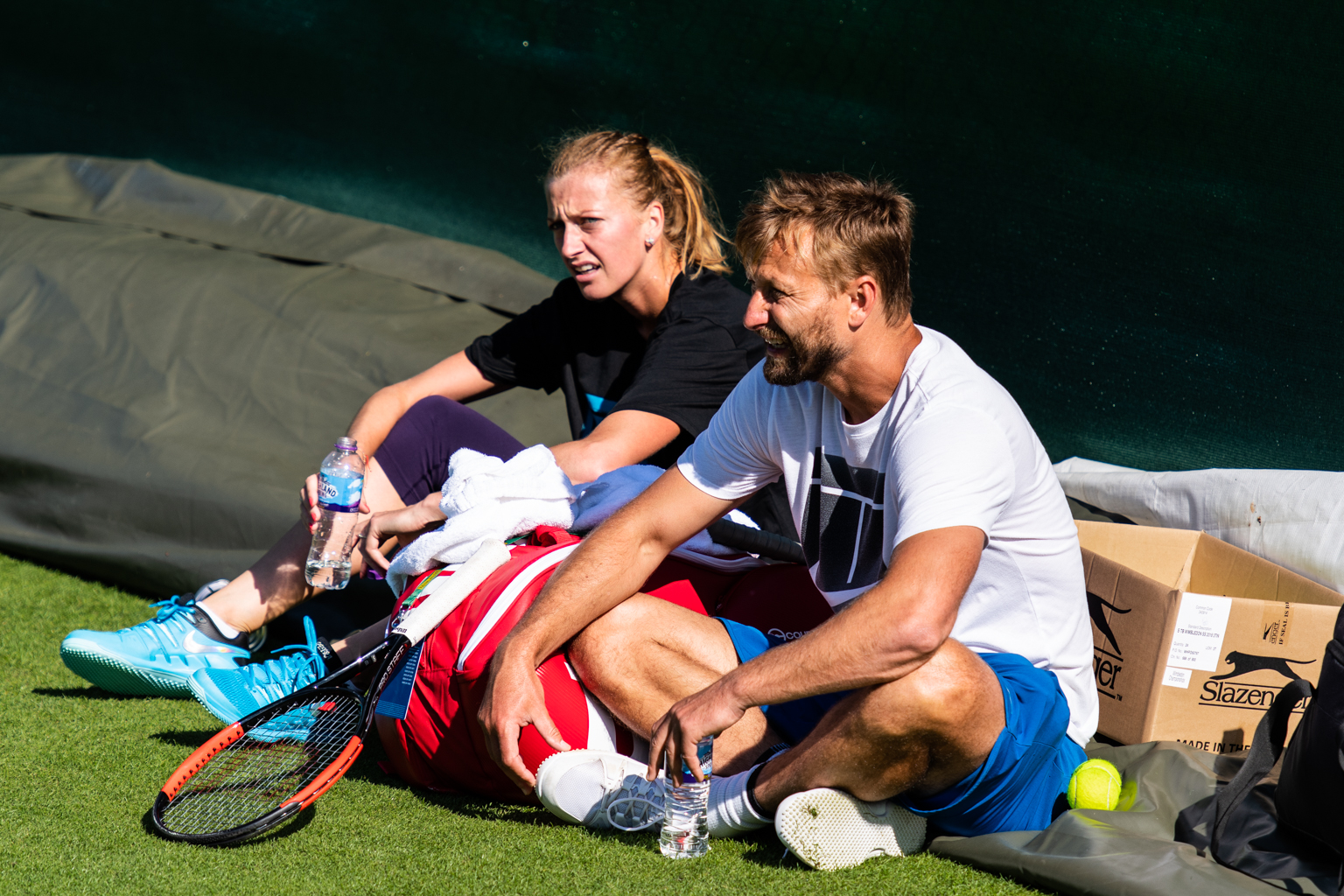 Petra Kvitova